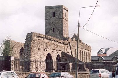 Sligo Abbey, Sligo, Ierland; eigen werk